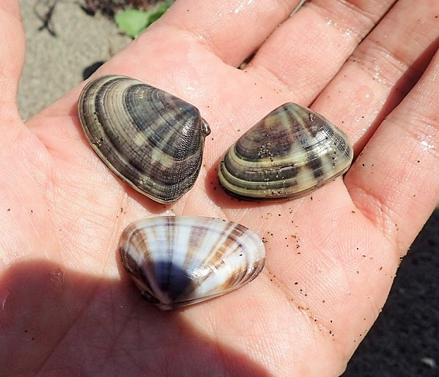 ナミノコガイ, 高知県東洋町生見, 2019